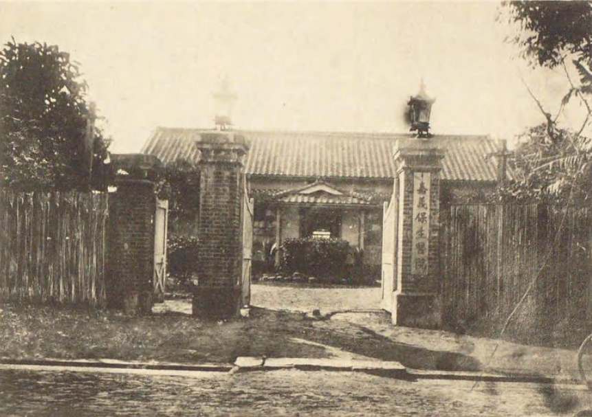 日治時期嘉義的傳染病醫院